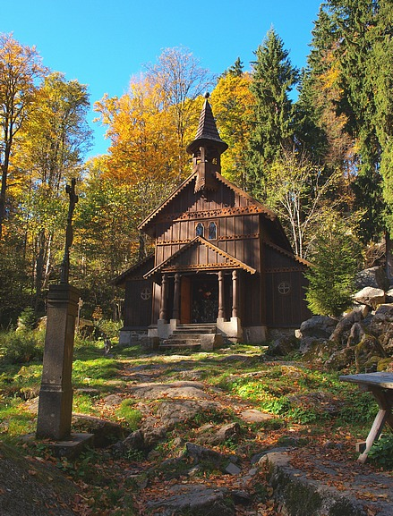 Stožecká kaple, celkový pohled